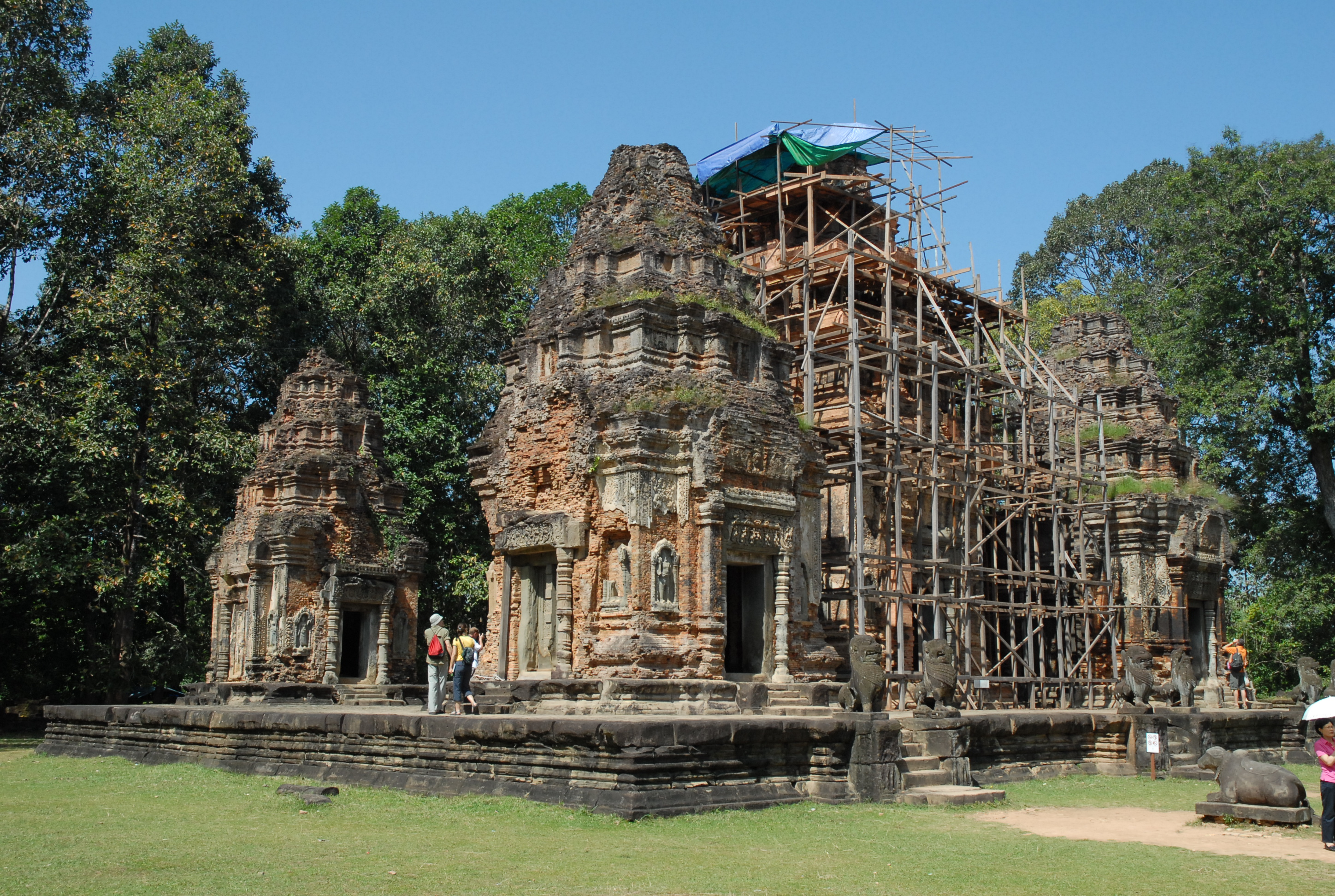 Cambodge, site archéologique d'Angkor (zone de Rolûos), temple de Preah Kô (fin du IXe siècle)